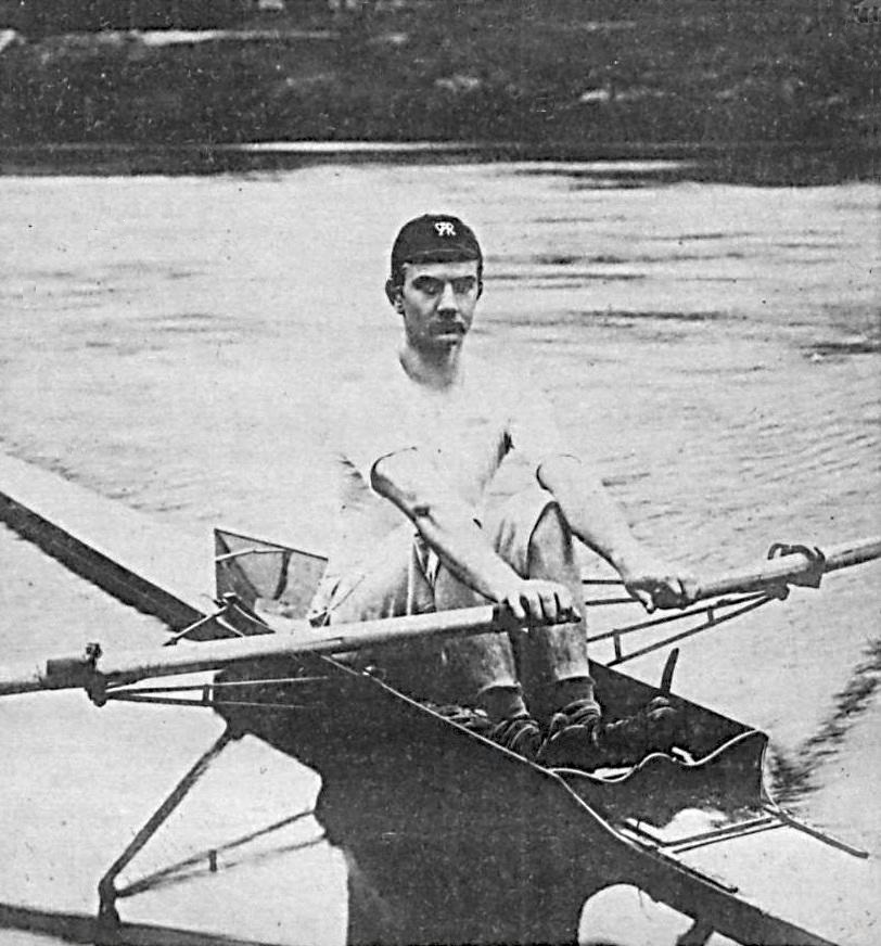 P. Houesn, champion de France d'aviron, le 2 octobre 1888 (skull).